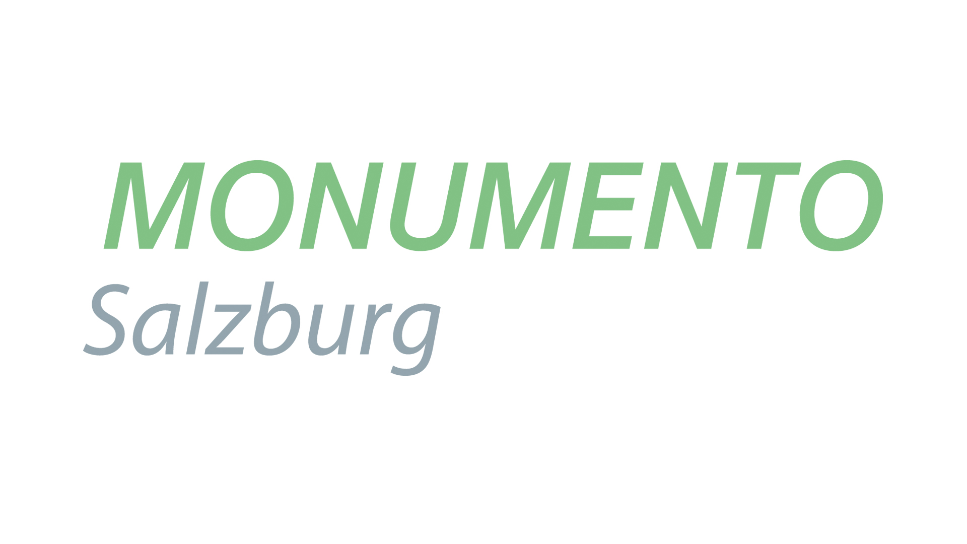 Neues Logo der Monumento